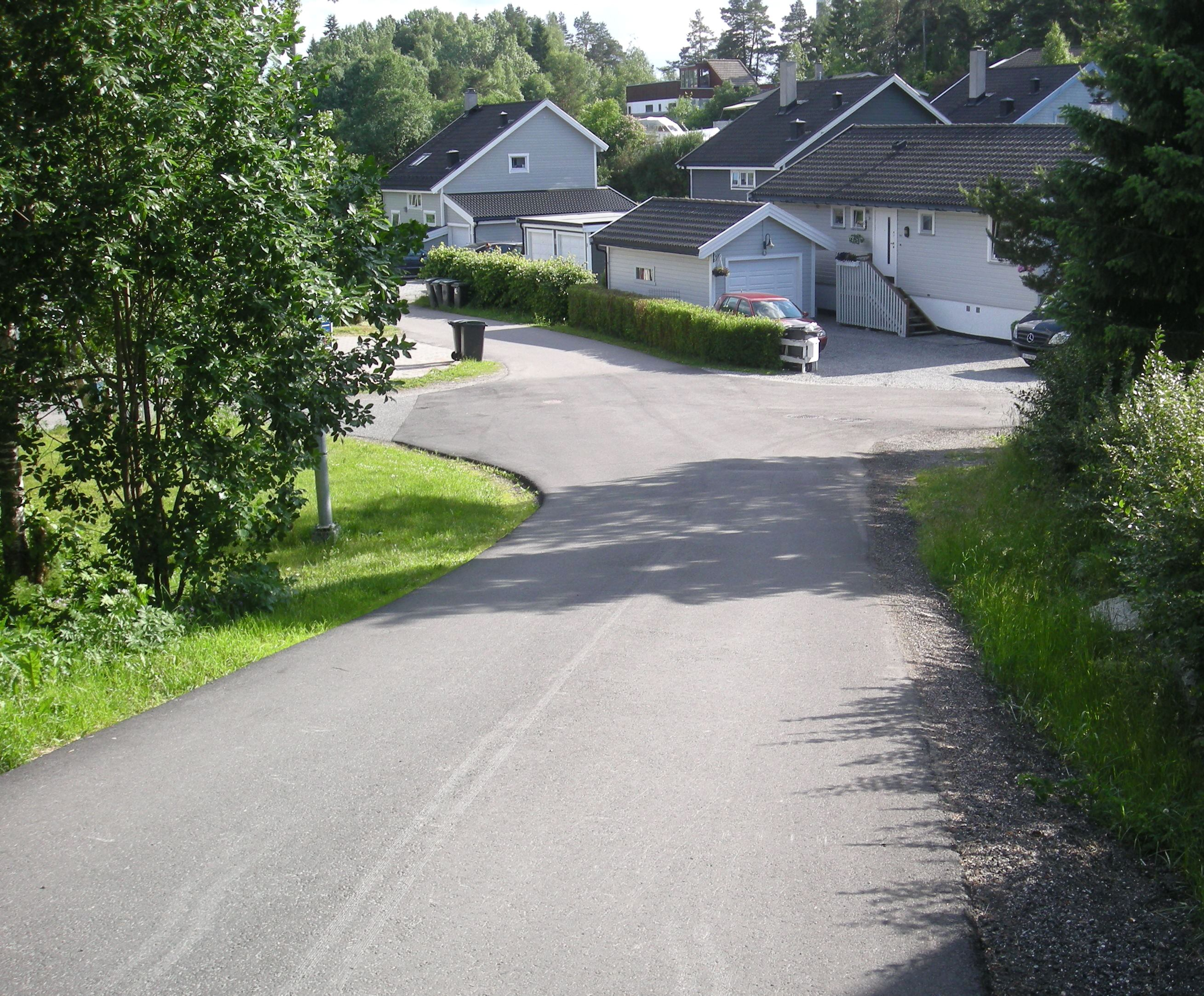 Gamle Brennavei(en) i Oslo